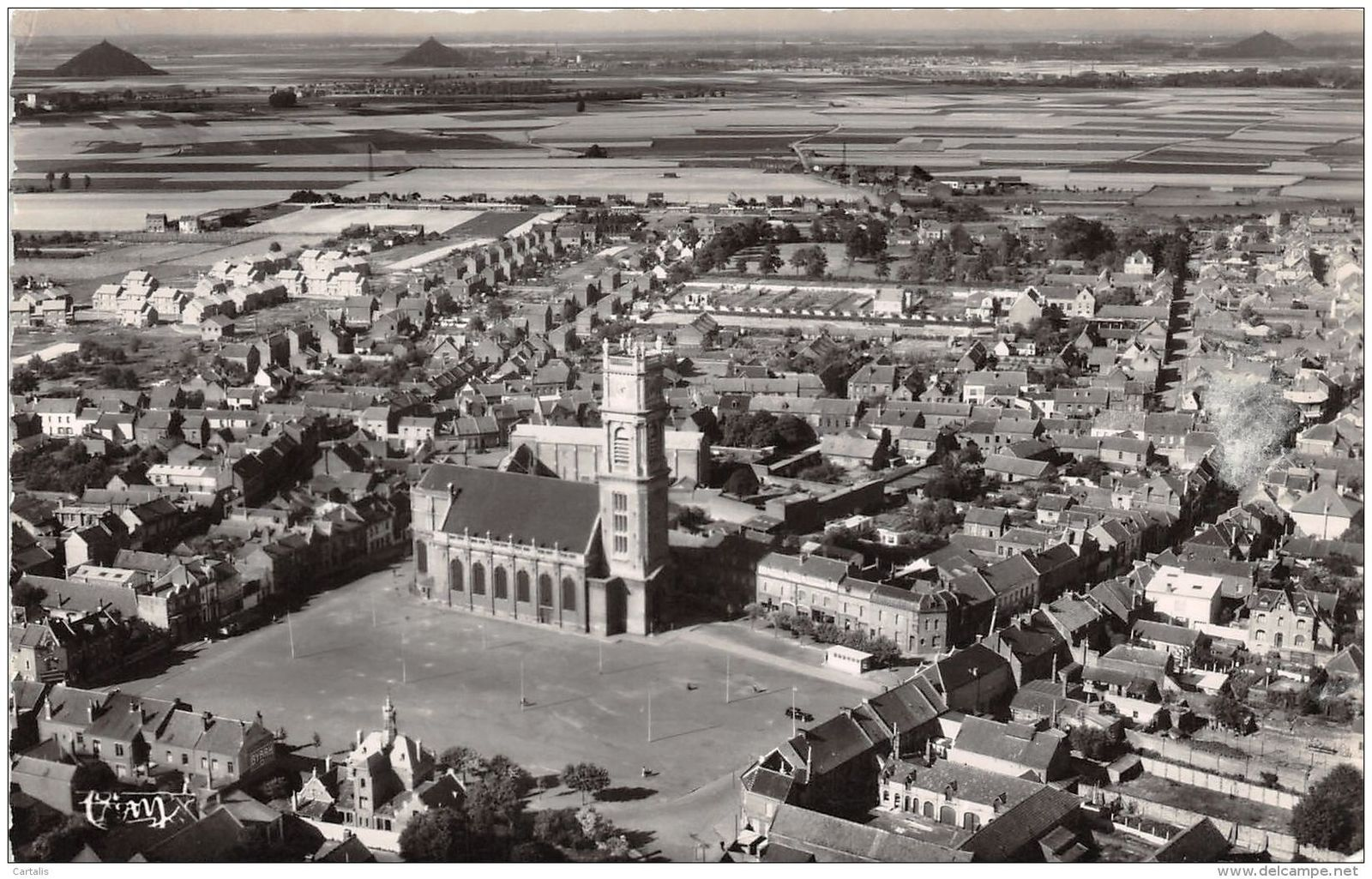 Harnes vue aérienne années 1930.